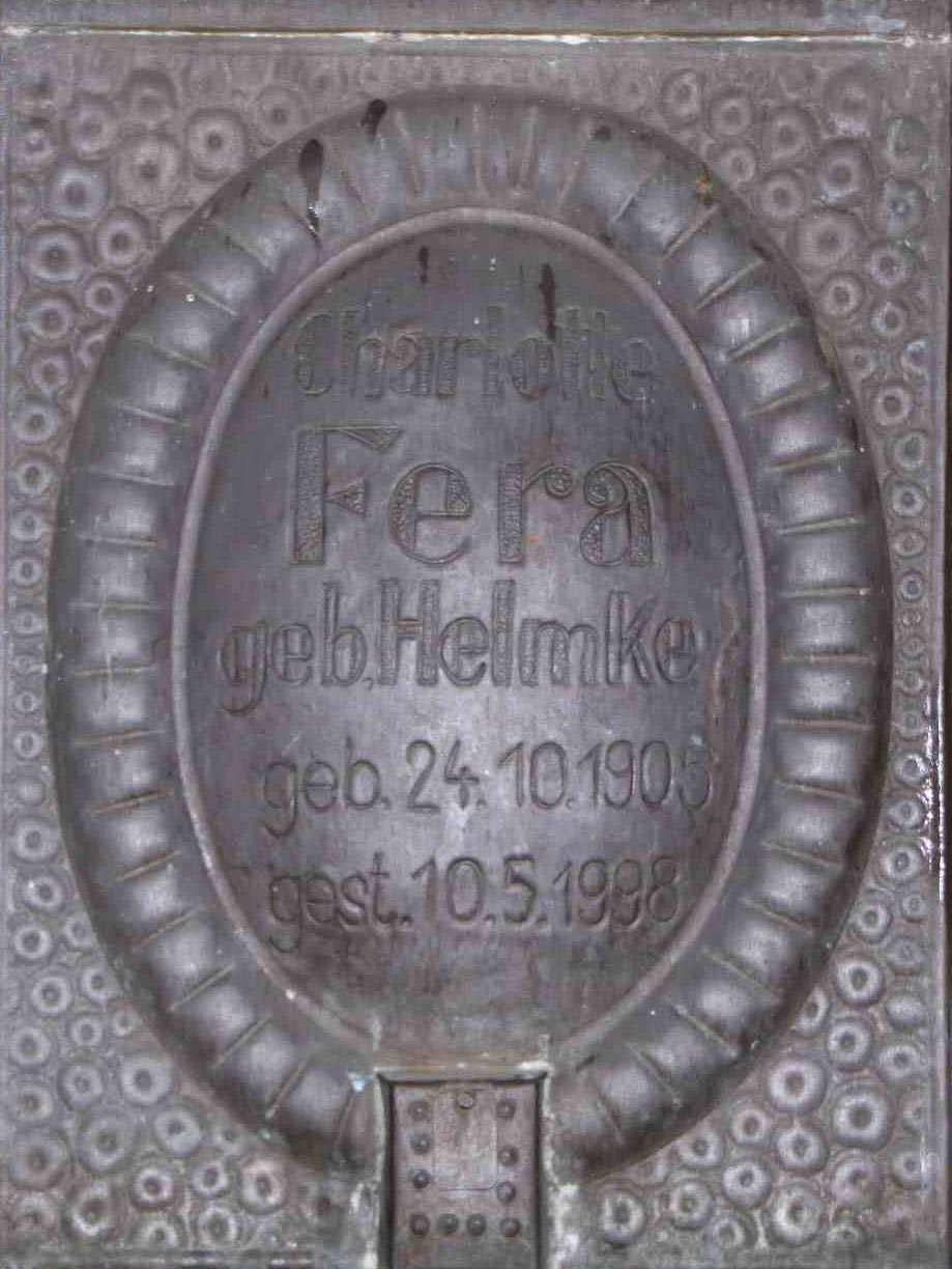 Charlotte Fera (* 24. Oktober 1905 in Bremen; † 10. Mai 1998 in Hamburg) war eine Hamburger Politikerin (CDU). Inhaltsverzeichnis